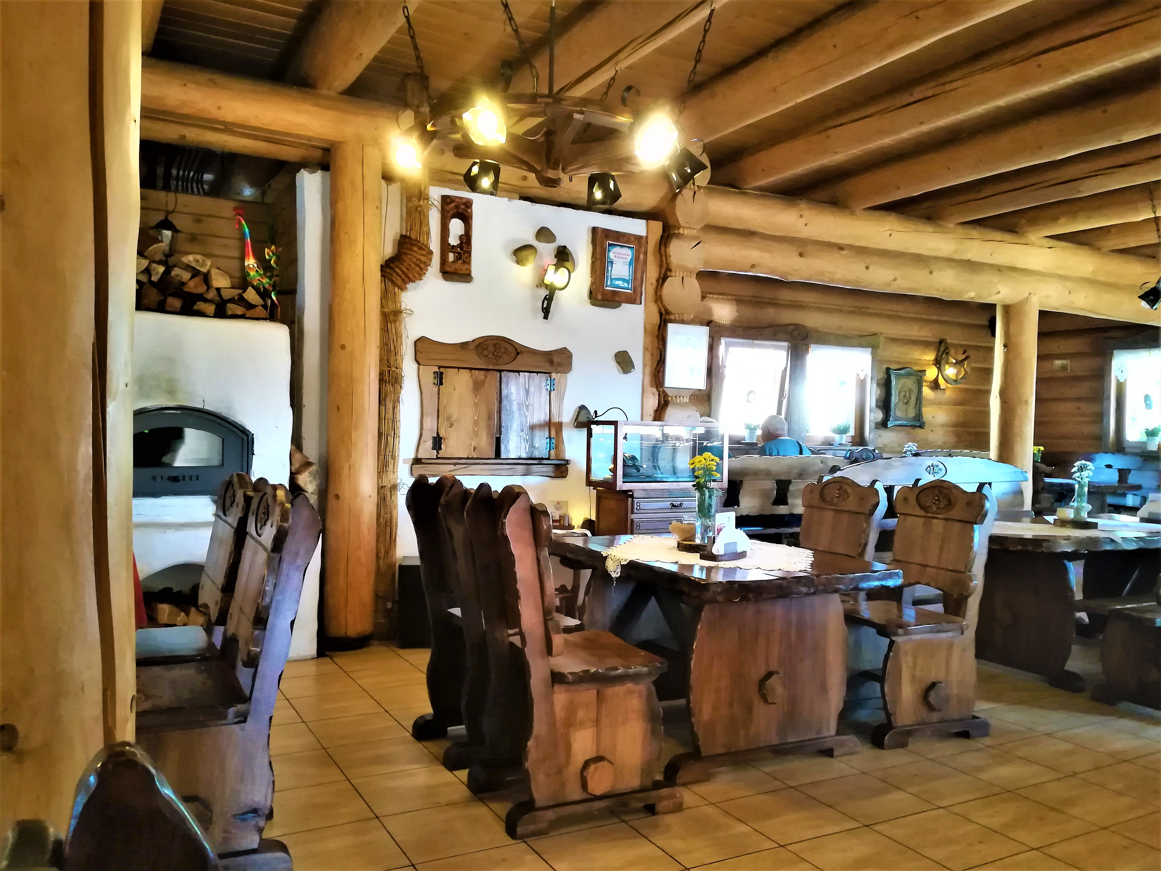 Karczma Zapiecek w Mirowszczyźnie.